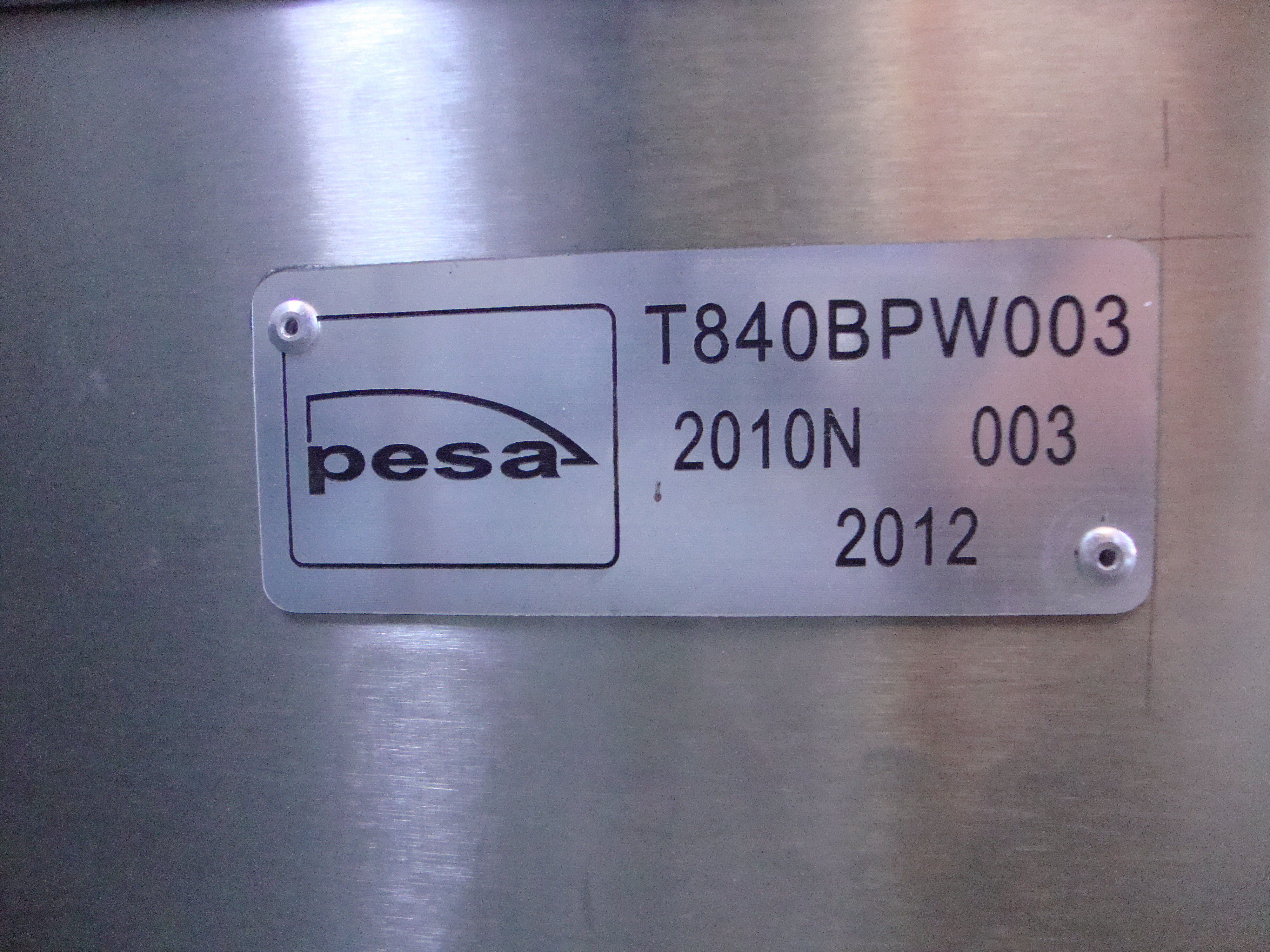 Tabliczka znamionowa z trzeciego członu